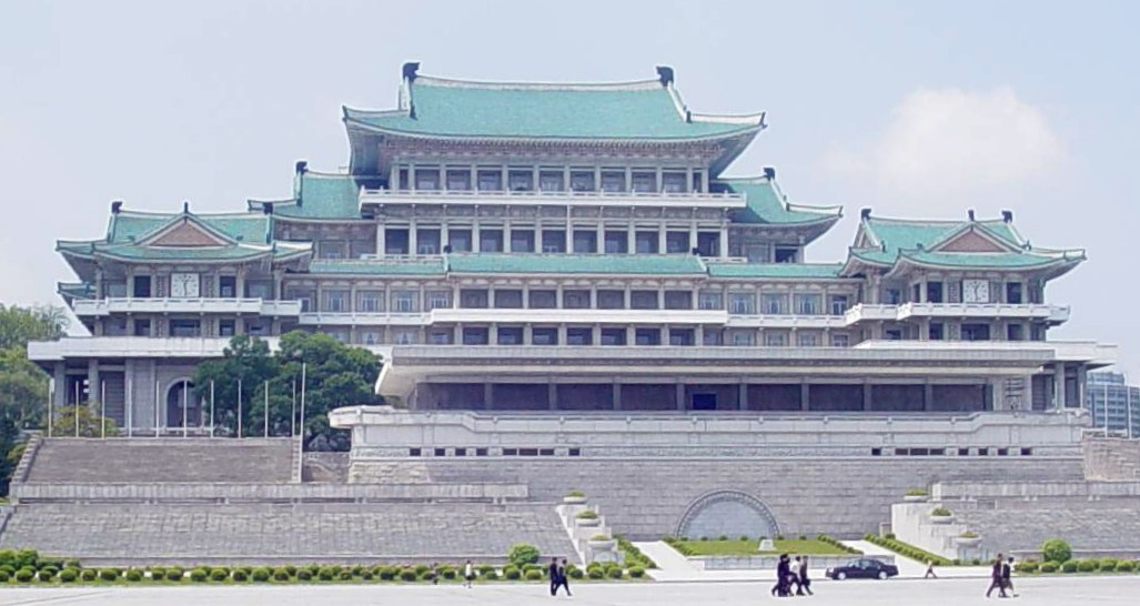 Große Studienhalle des Volkes in Pyong Yang, Nordkorea (20. Mai 2005)